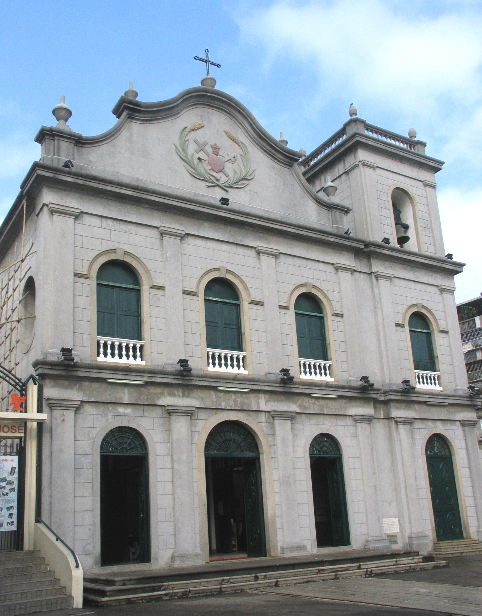 Igreja de Sao Lazaro in Macao 澳門聖母望德堂 Photo taken by Glio